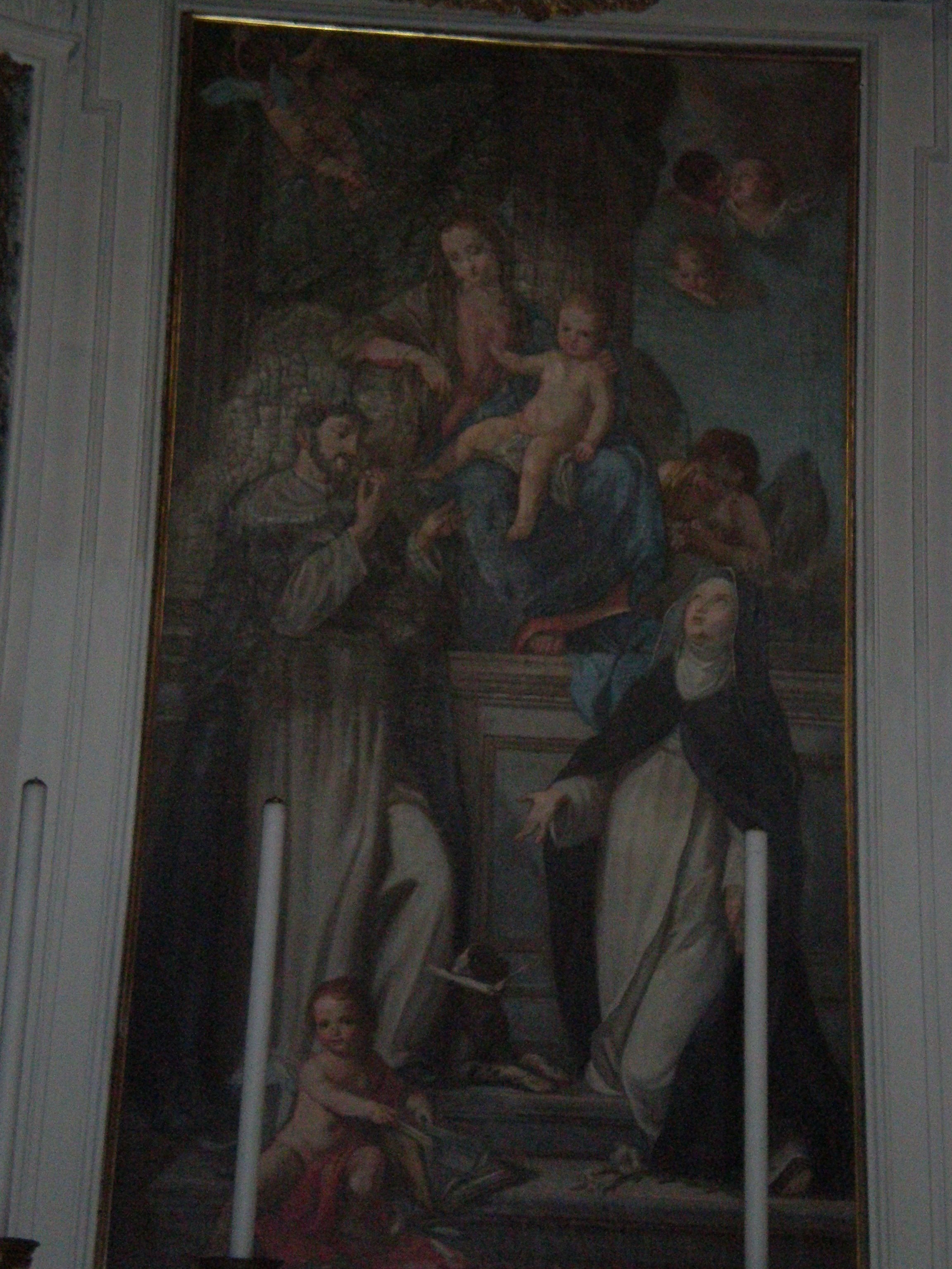 Madonna del Rosario opera di Bartolomeo Zeni conservata nella chiesa parrocchiale Sant'Antonio abate di Magasa, provincia di Brescia, Italia.